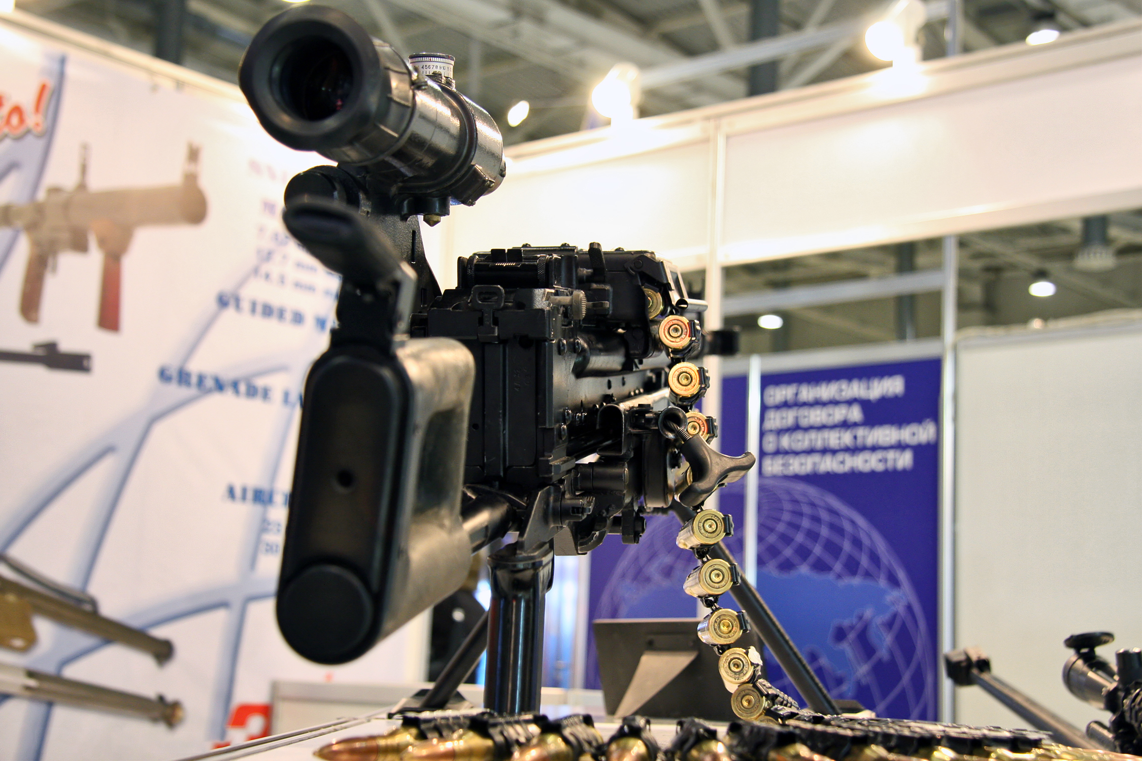 12,7-мм пулемет Корд (12,7mm Kord machinegun)